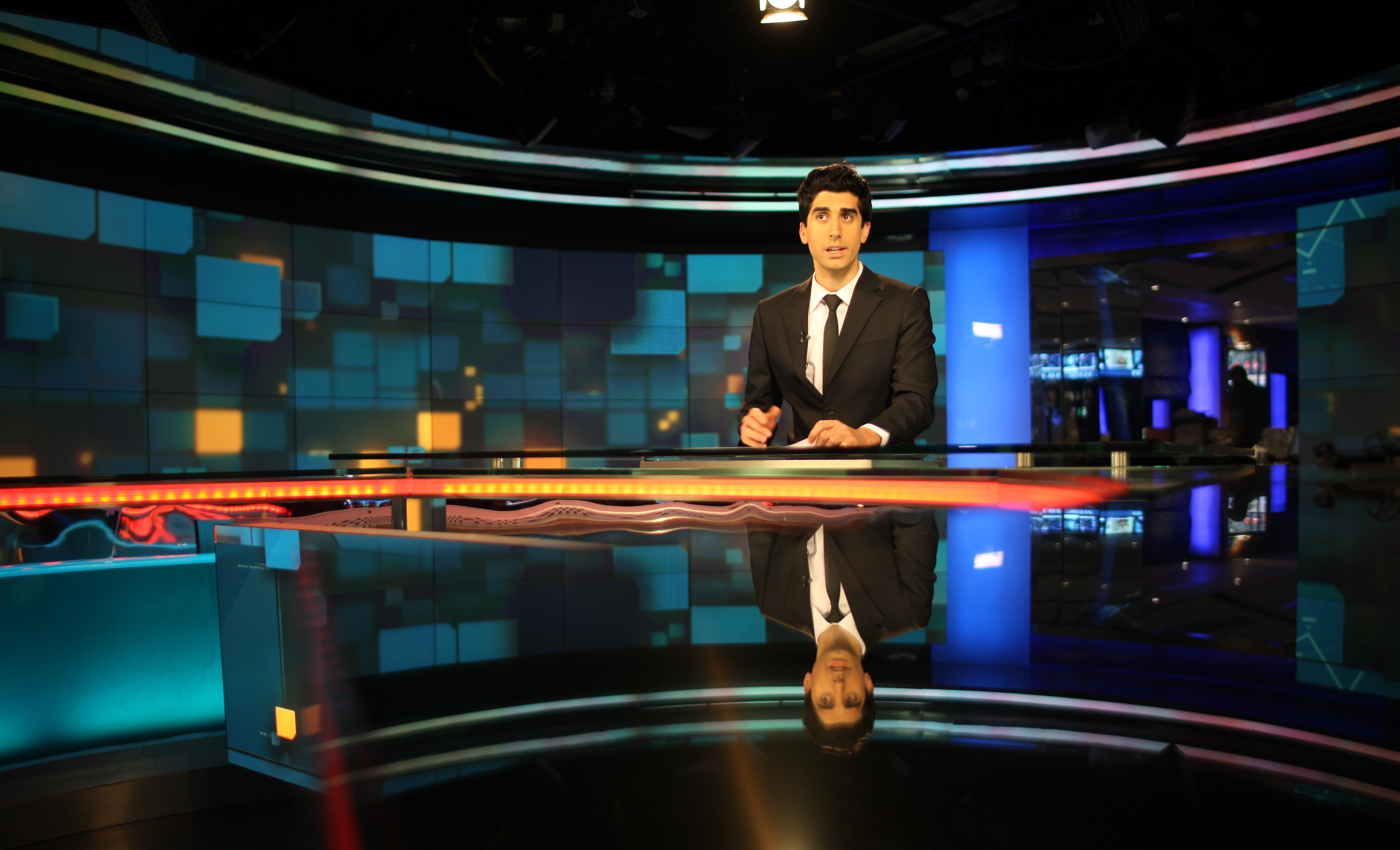 חן אטיאס מגיש מבזק חדשות מאולפן ערוץ 10 בגבעתיים.